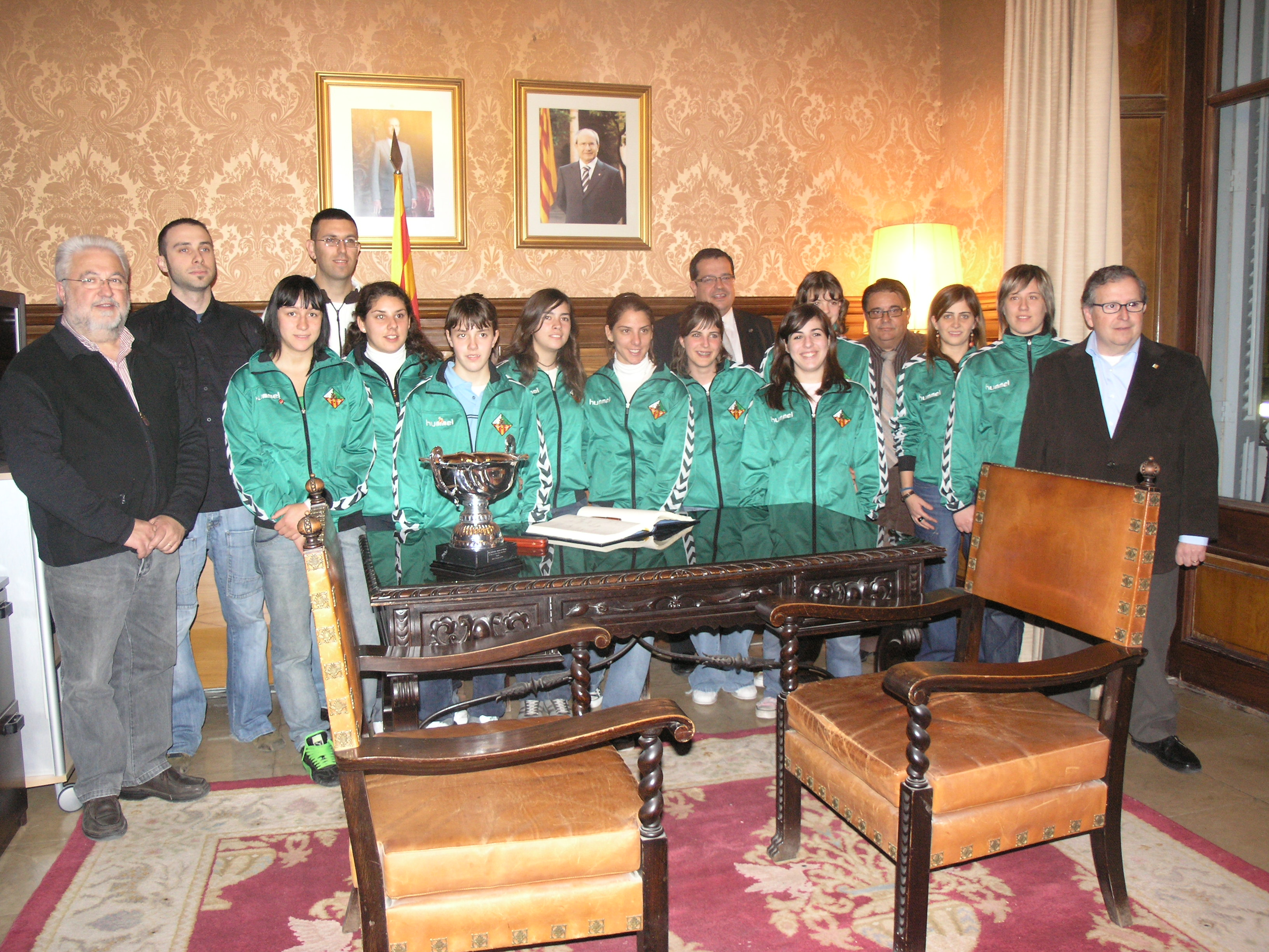 Recepció a l'equip sènior femení del Club Patí Vilanova l'Ull Blau després de proclamar-se campió de la Copa de la Reina.